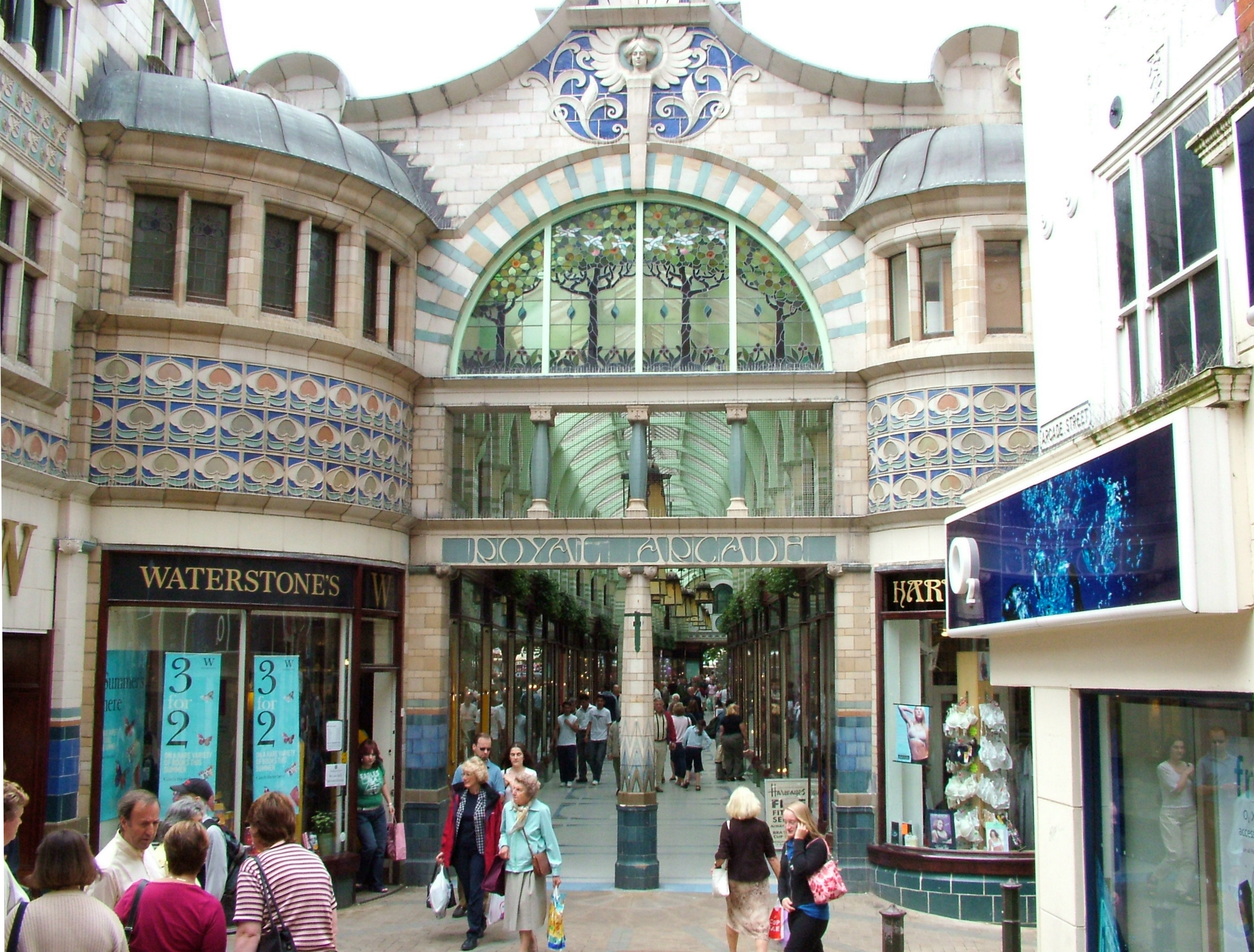 Norwich (UK), Norwich Arcade